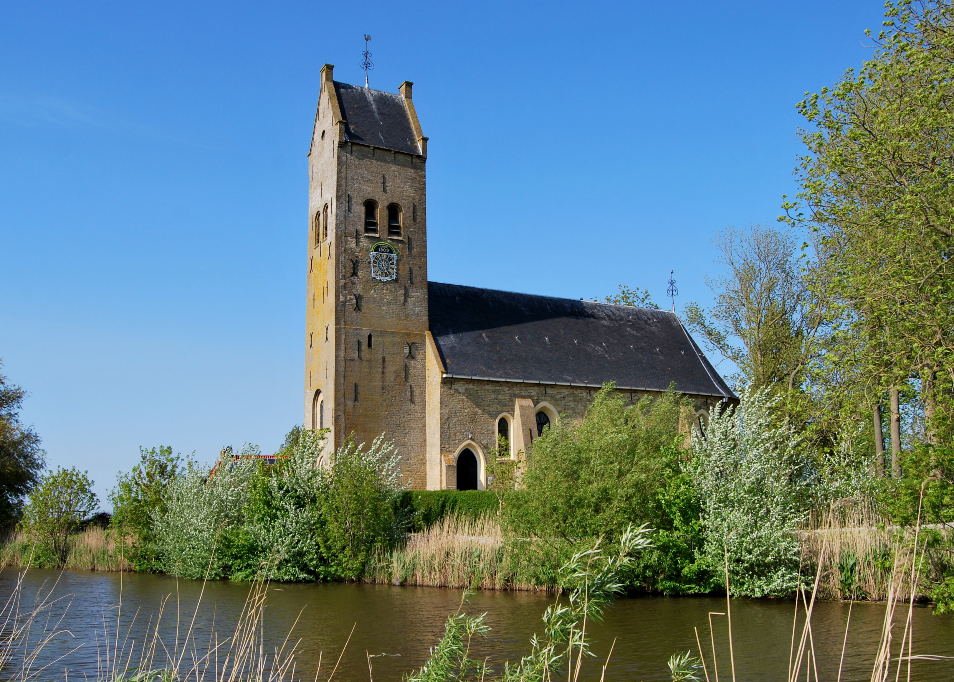 Hichtum, prot. kerk